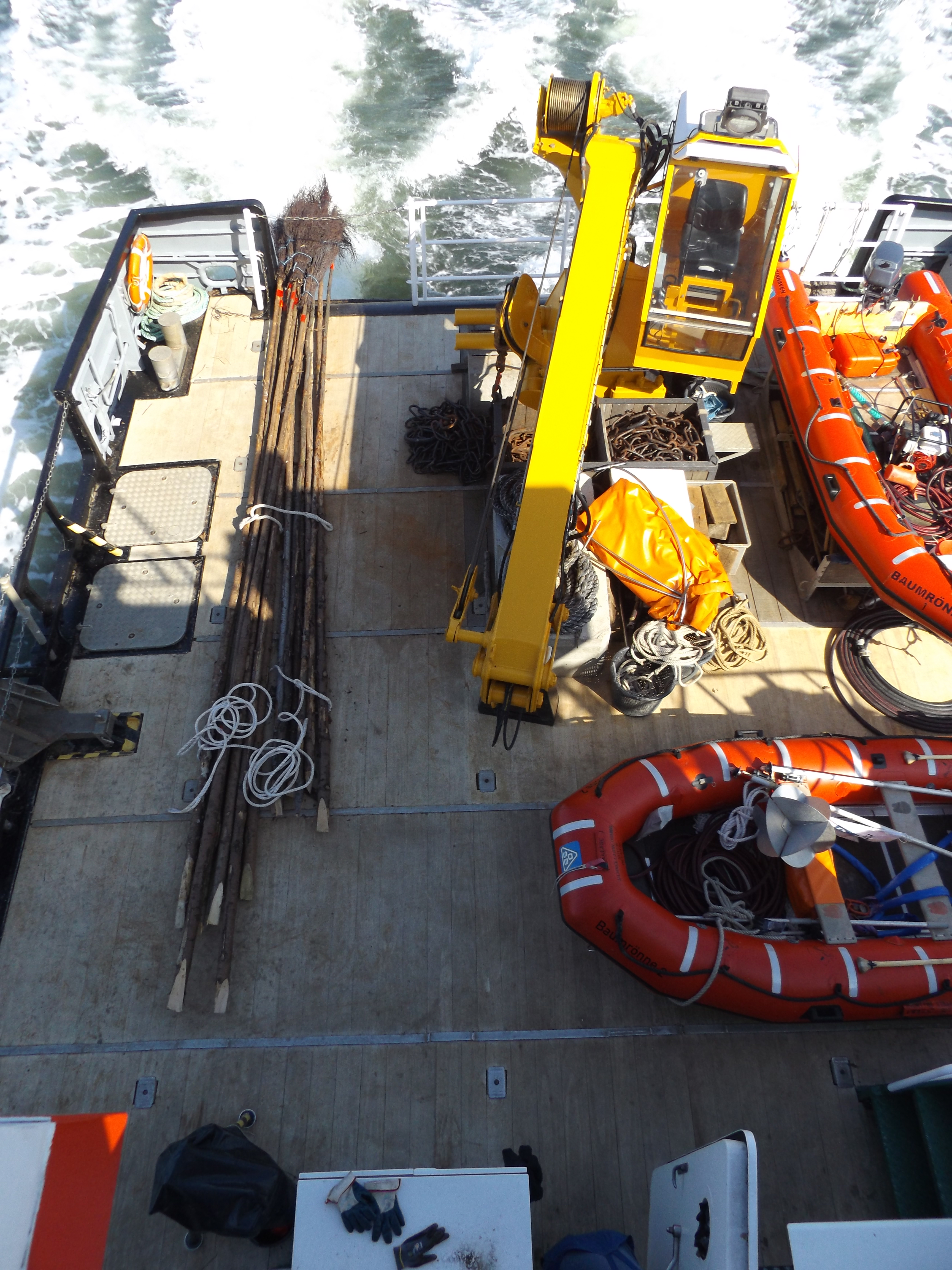 SZS BAUMRÖNNE